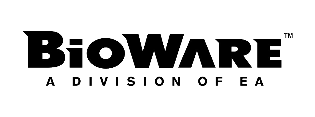 Logotype de Bioware